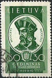 Gediminas